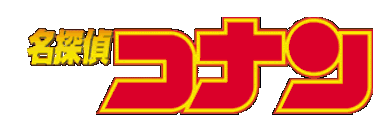 Logo von Meitantei Conan(manga)